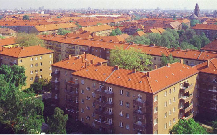 Künstlerkolonie Berlin im Bezirk Wilmersdorf von oben